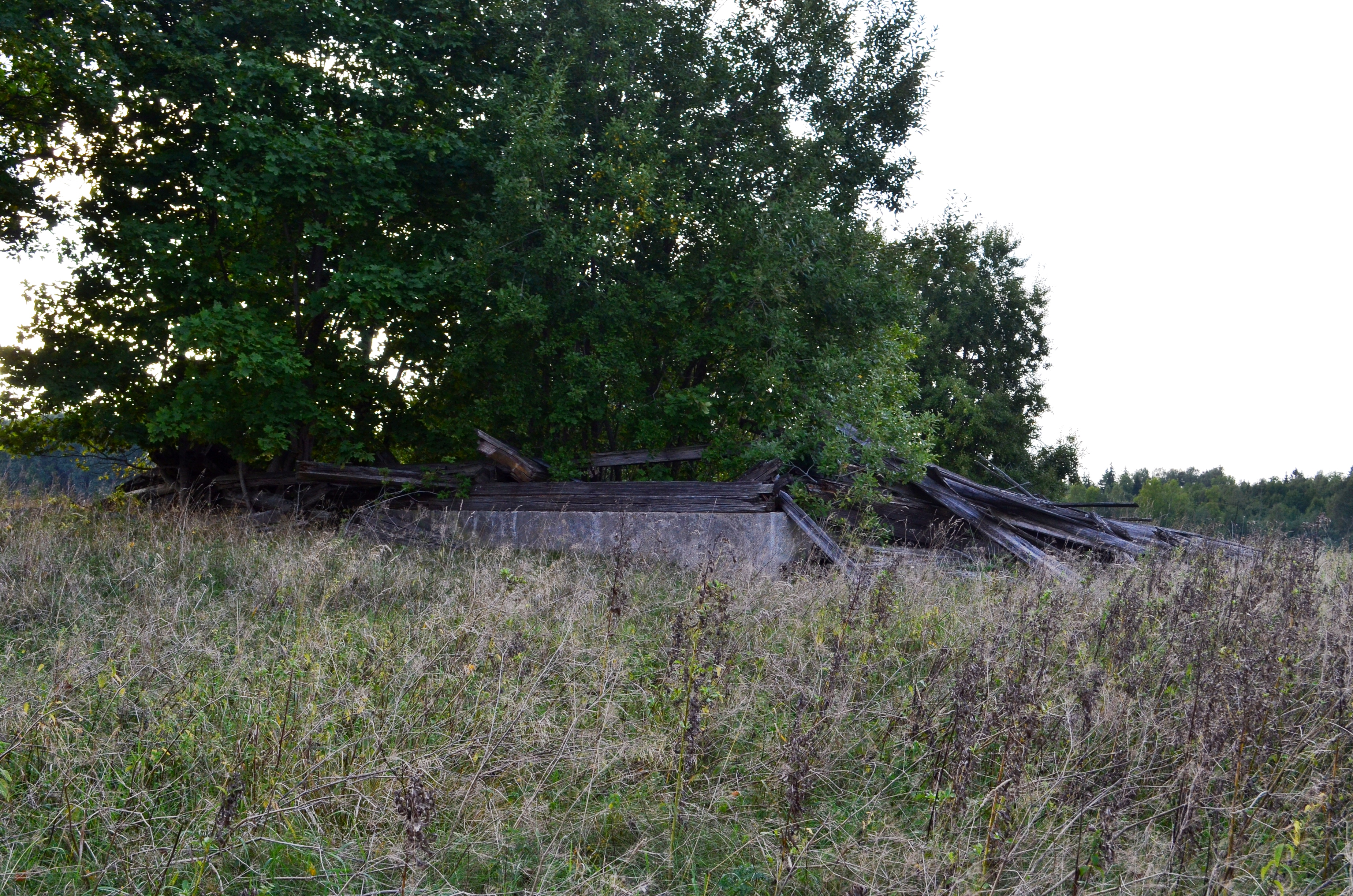 Cerkvės griuvėsiai, Dvarčiai, Radviliškio raj.